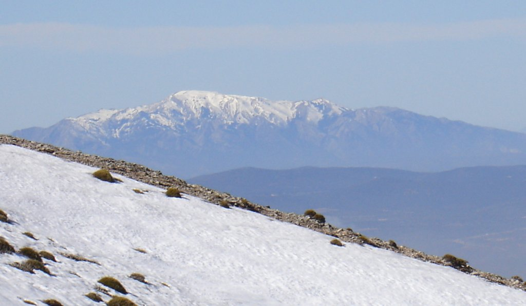 Vista de la Maroma desde la Sierra de Huenes